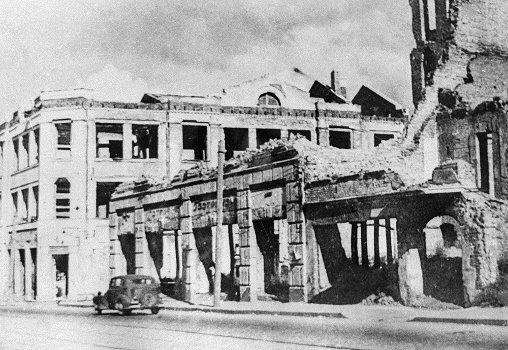 Вызваленне Мінска. Вуліца Савецкая. На месцы разбуранага будынка цяпер дом з гадзіннікам на рагу вуліц Камсамольскай і праспекта Незалежнасці.